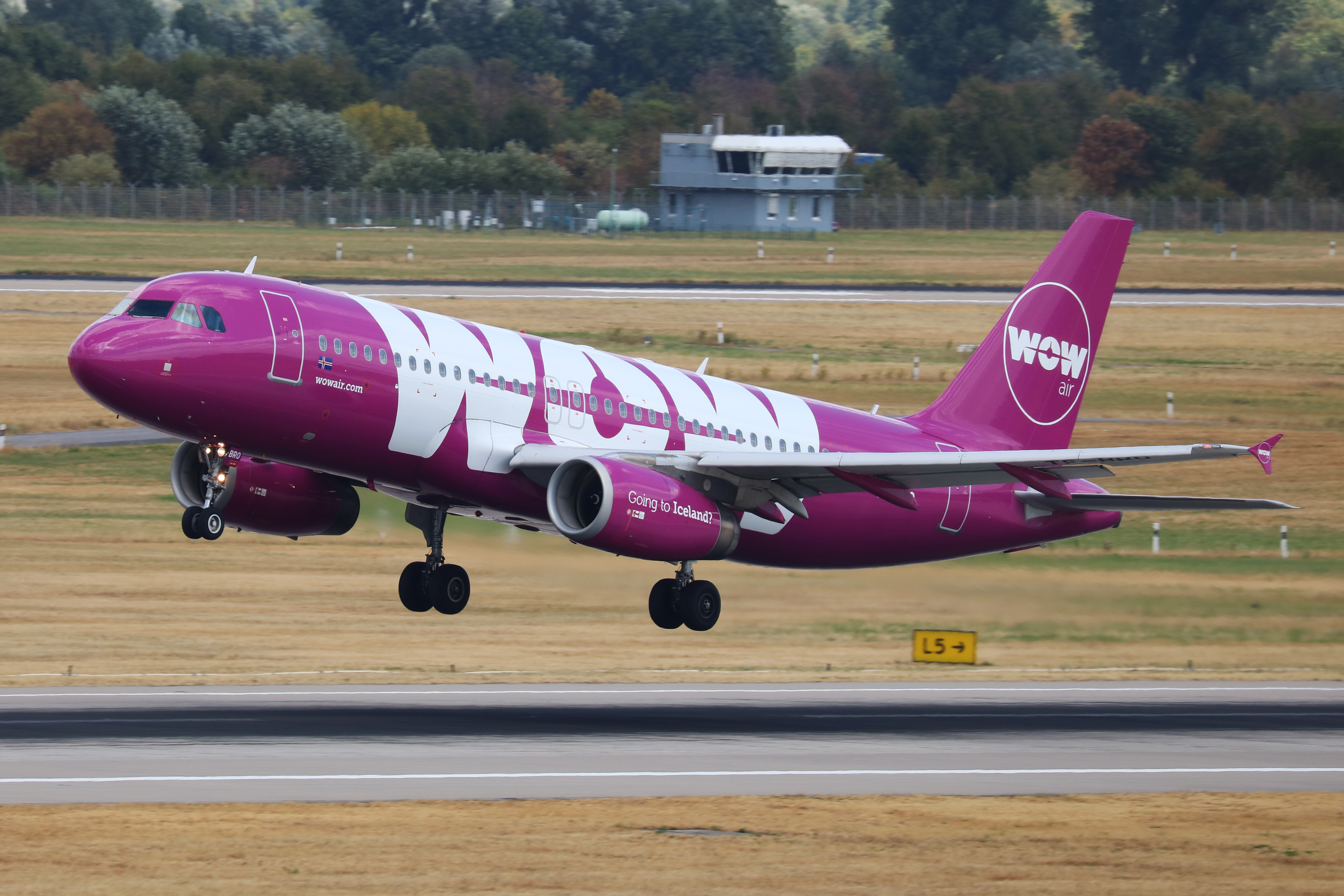 Flughafen Düsseldorf, Airbus A320-200 (TF-BRO) der WOW air